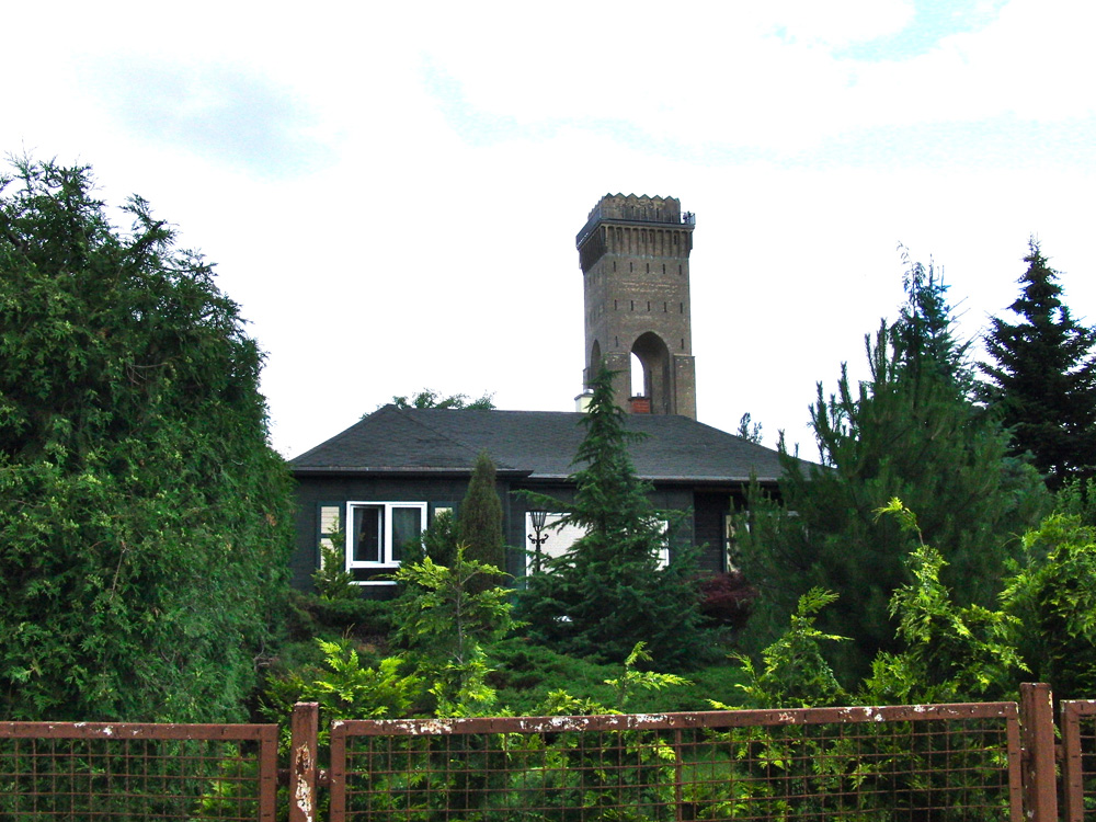 Kupferhaus in der Messingwerksiedlung und expressionistsicher Wasserturm von Paul Mebes, Eberswalde-Finow